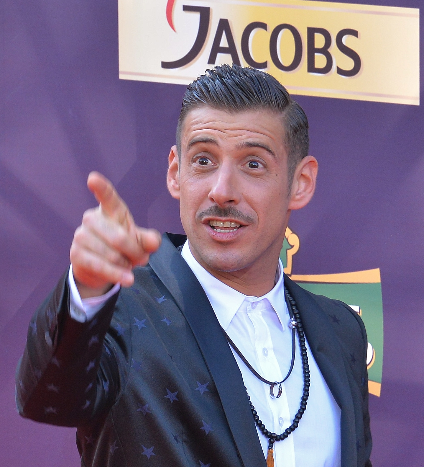 ІІталійський співак Франческо Габбані на церемонії відкриття Євробачення 2017 у Києві